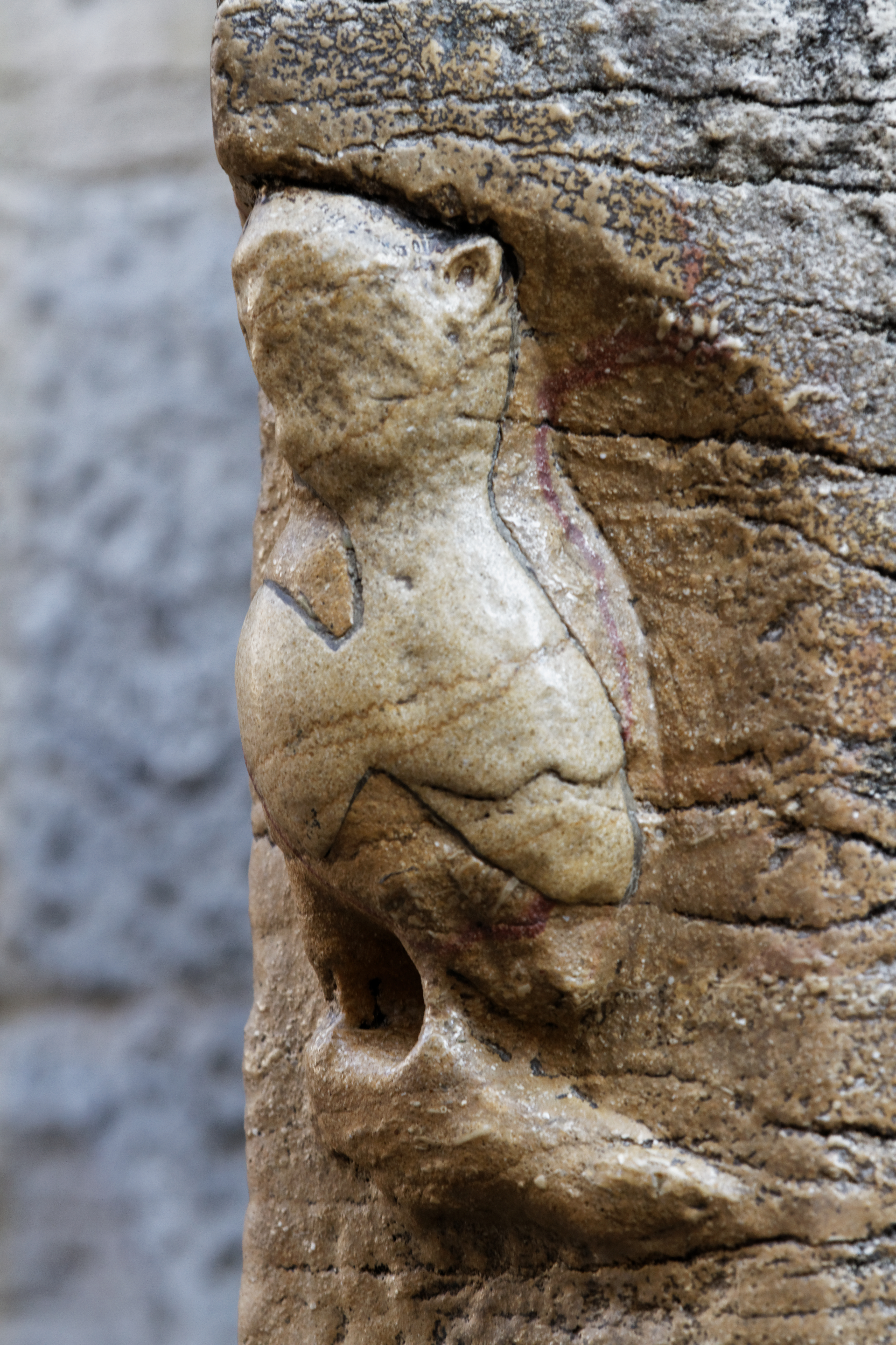 La statue de la chouette à Dijon en Côte d'Or.